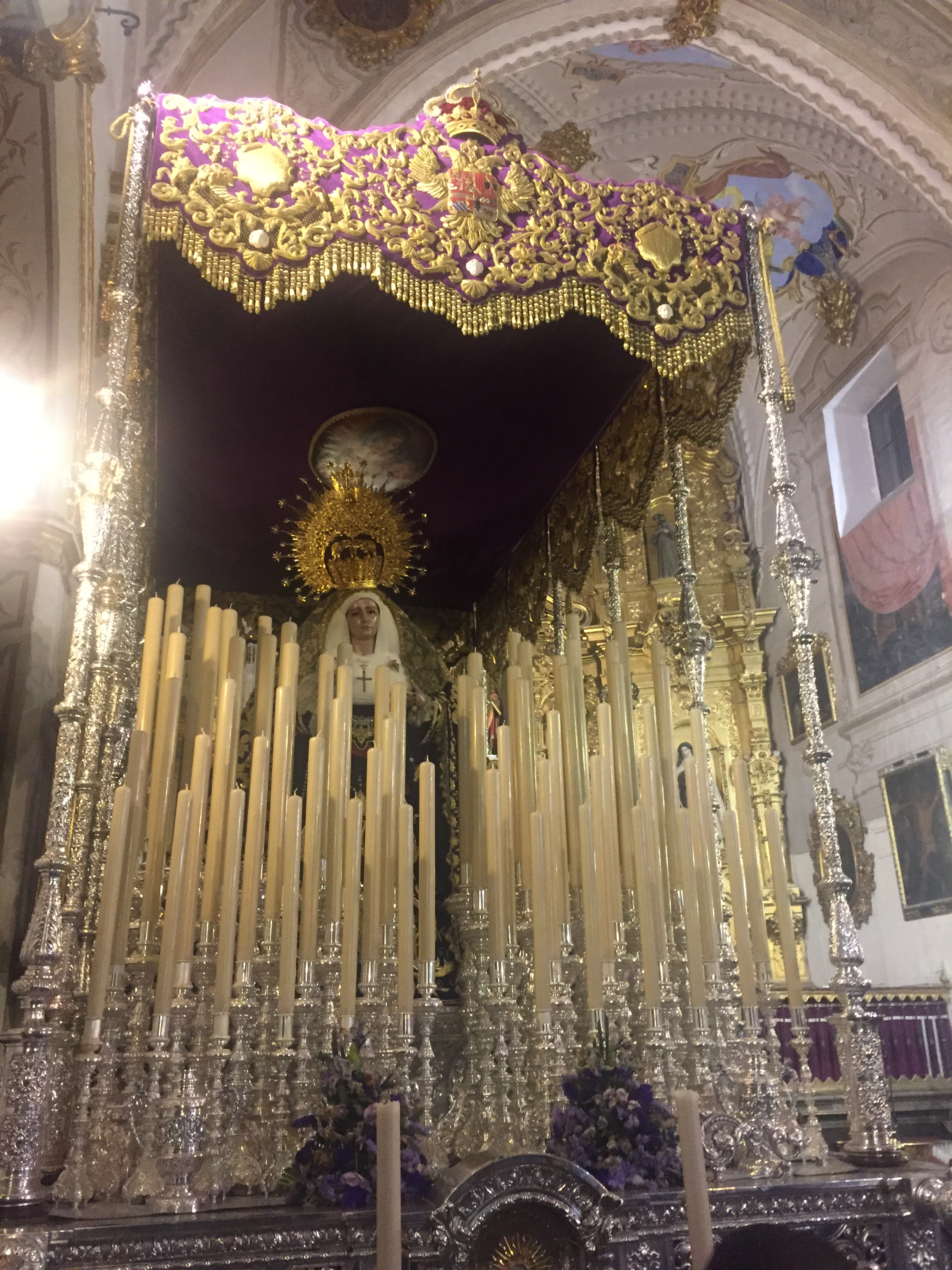 Virgen penas